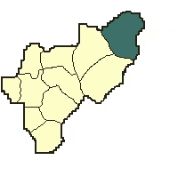 Stadt Bad Berleburg im Kreis Siegen-Wittgenstein